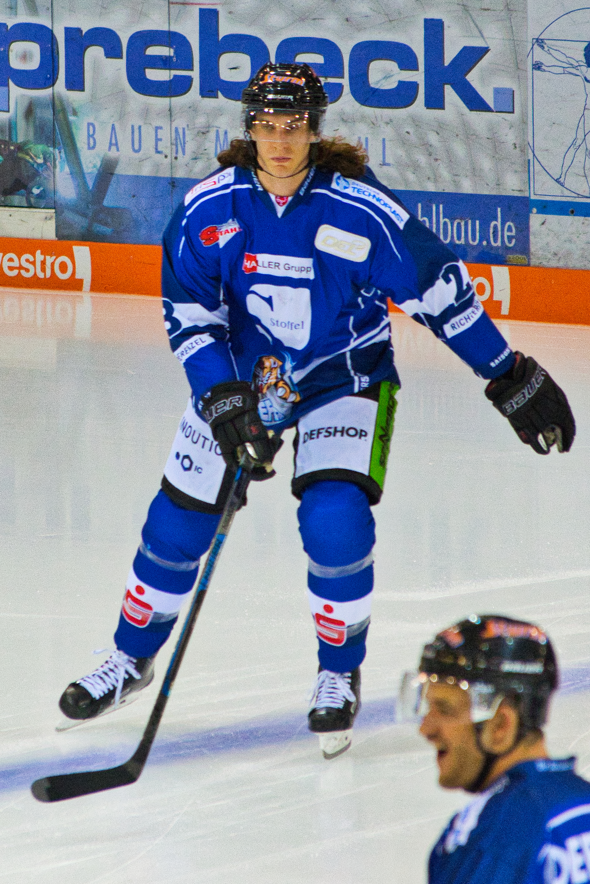 Antoine Laganiere im Trikot der Straubing Tigers.